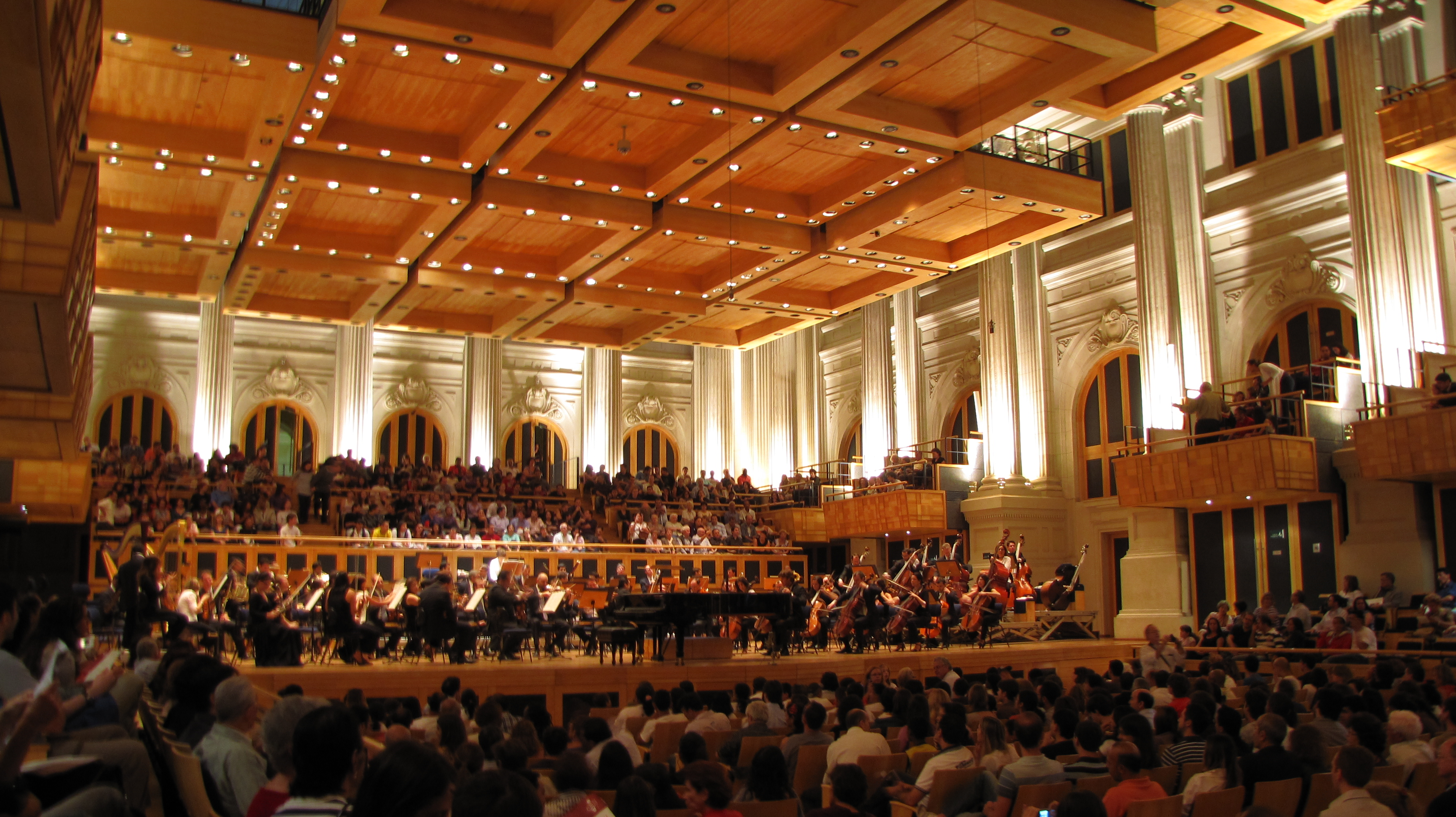 Sala São Paulo, na cidade de São Paulo, Brasil.